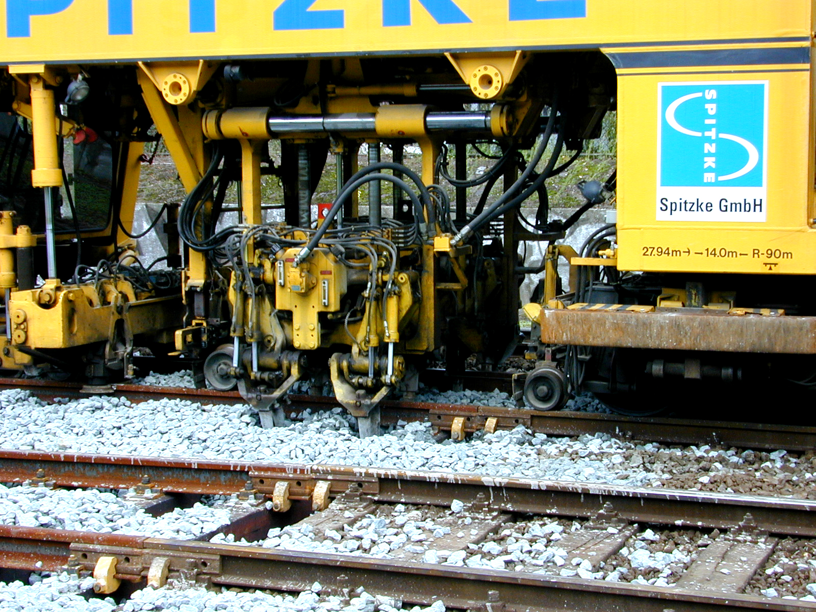 Spitzke GmbH stopmaschine van het Plasser & Theurer type 08-275 Unimat 3S te Groningen. De werkzaamheden werden uitgevoed voor Volker Rail.